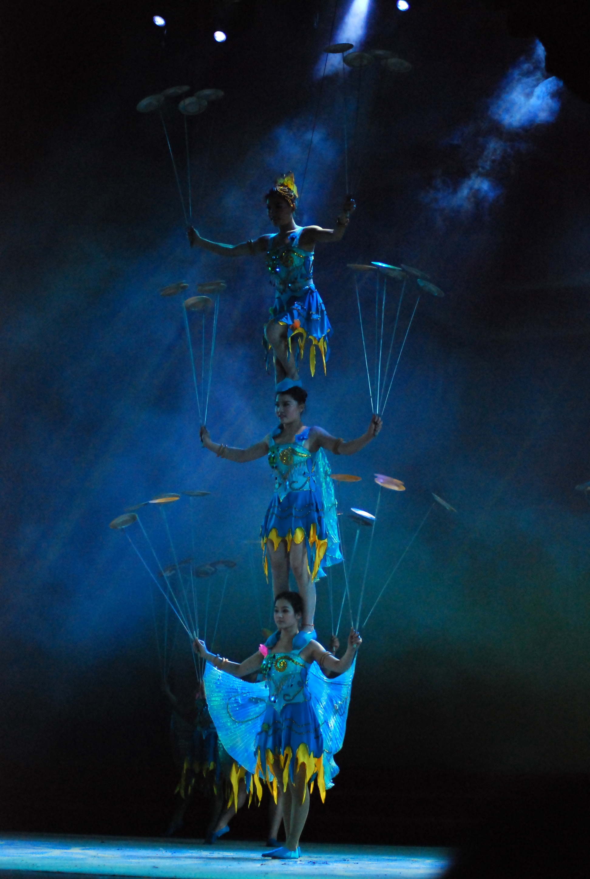 中国杂技——抖盘